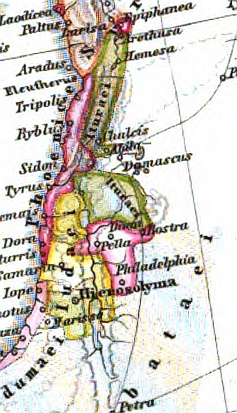 Ituräa und Judäa